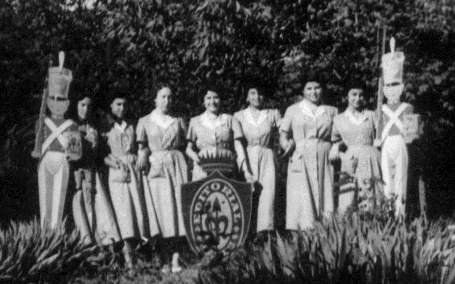 Secretarias Editorial Mateu